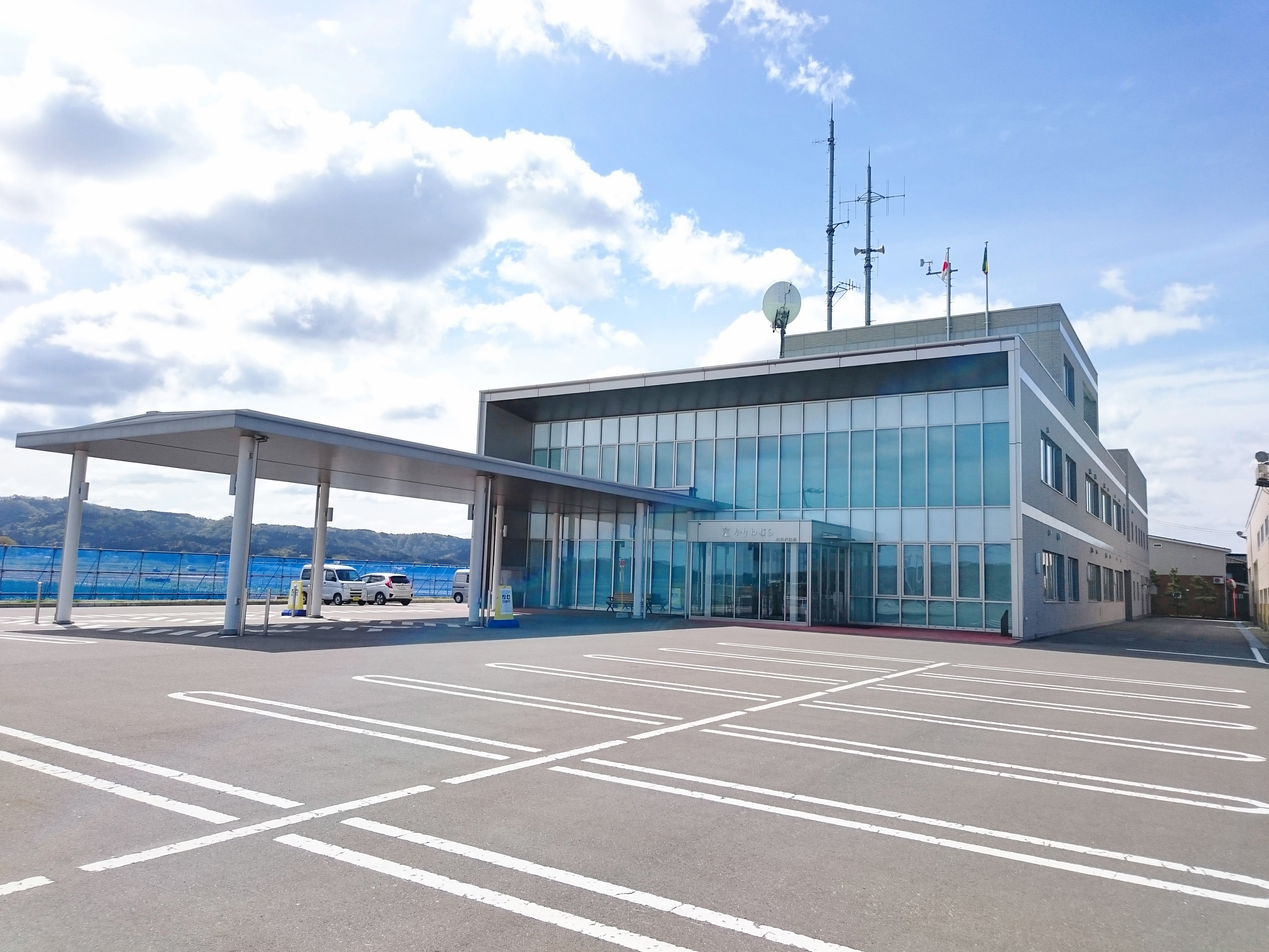 刈羽村の新しい役場庁舎